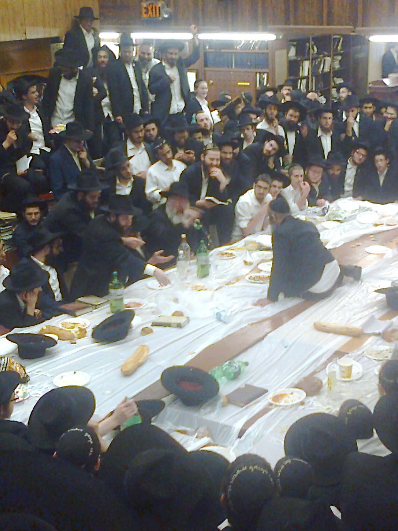 התוועדות וסיום הרמב"ם הרב יצחק אייזיק לנדא (מולו - על השולחן - הרב משה הלל) במוצאי שבת סליחות ב-770